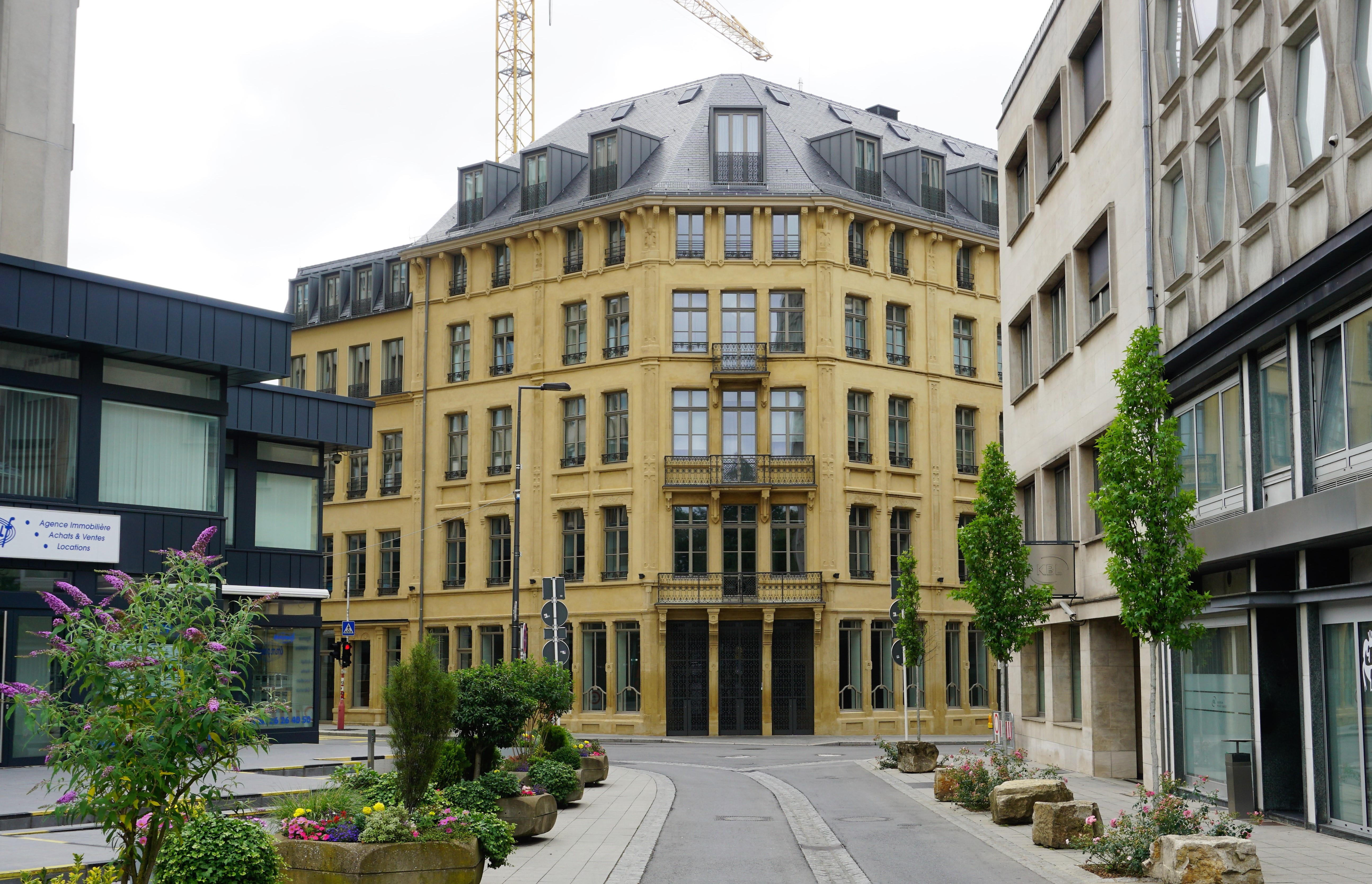 Fënsterschlass ("château vitré"), après la re-construction.